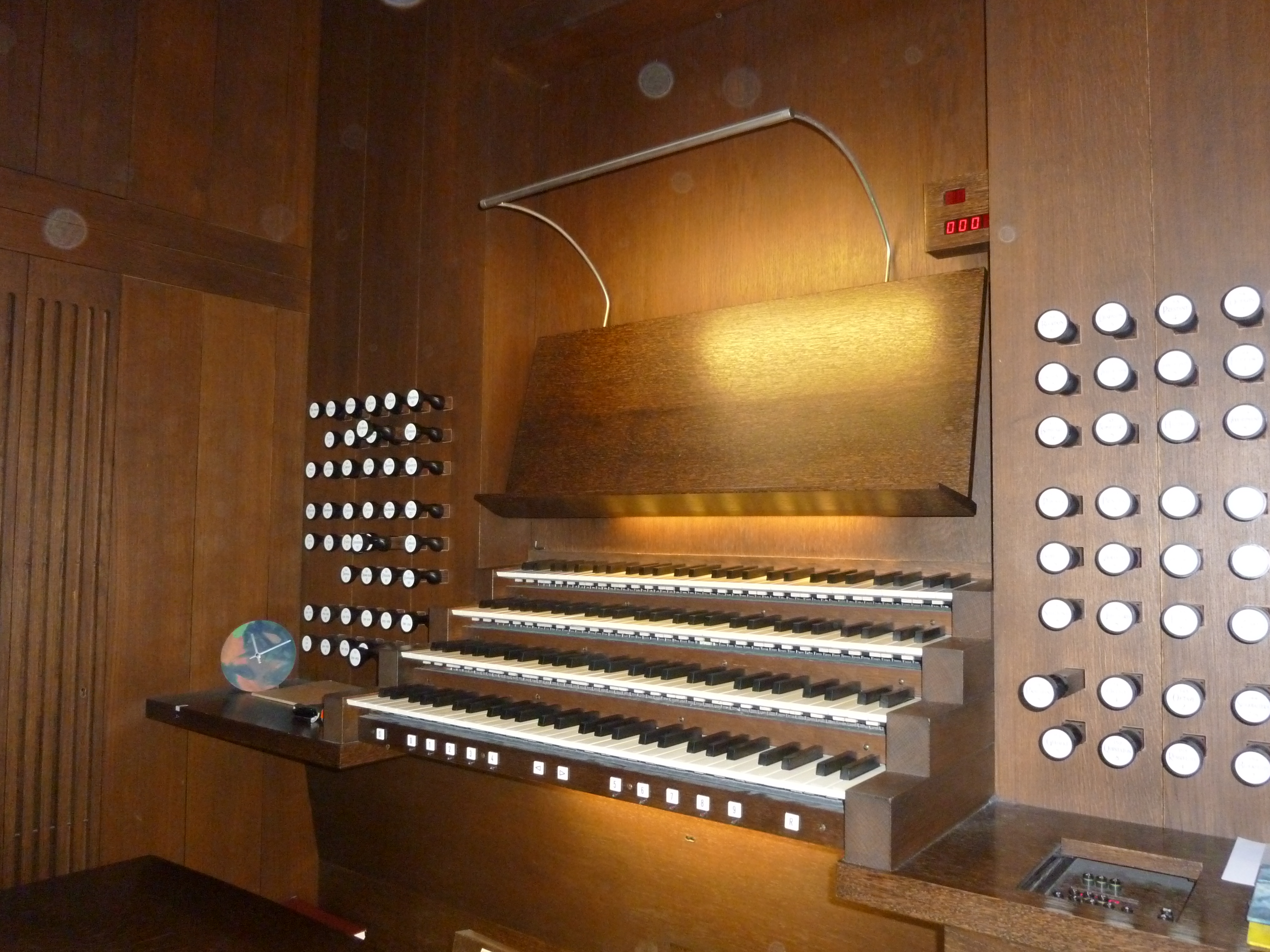 Orgel des Basler Münsters